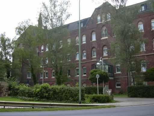 Niederau (Düren), Marienkloster own work papa1234 2006-08-12